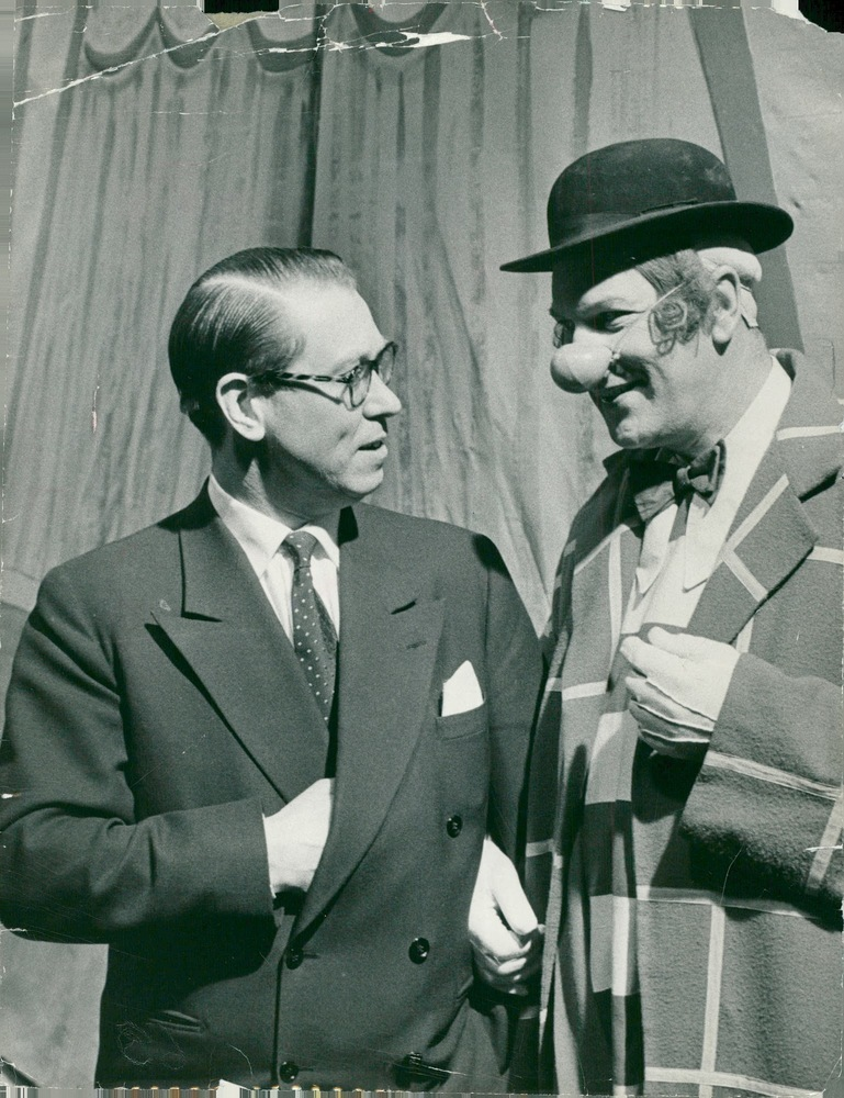 TV-chefen Henrik Hahr (1911–1985) och programledaren Sigge Fürst (1905–1984); den senare kostymerad för tv-programmet "Sigges Cirkus".